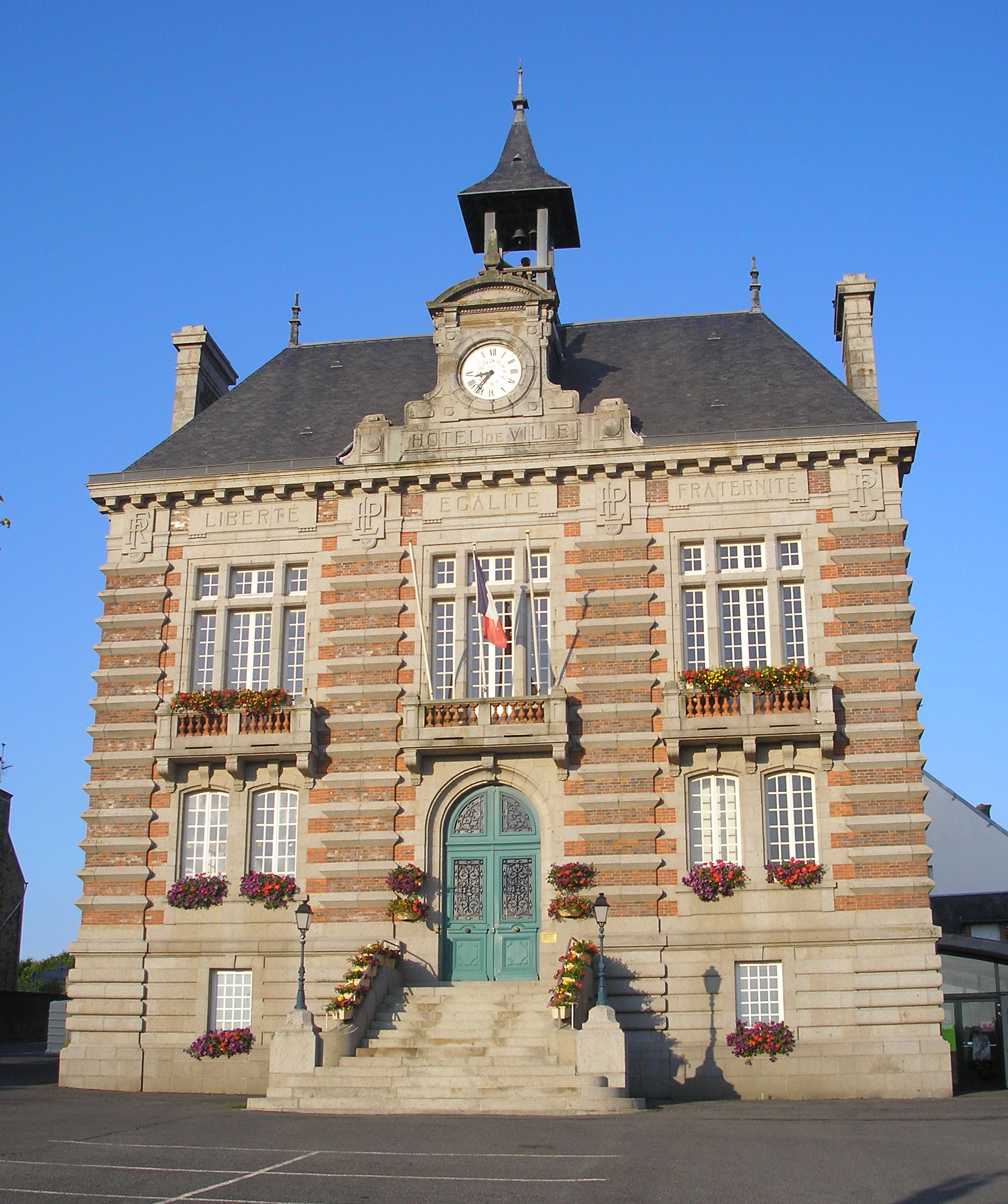 La Haye-Pesnel (Normandie, France). L'hôtel de ville.